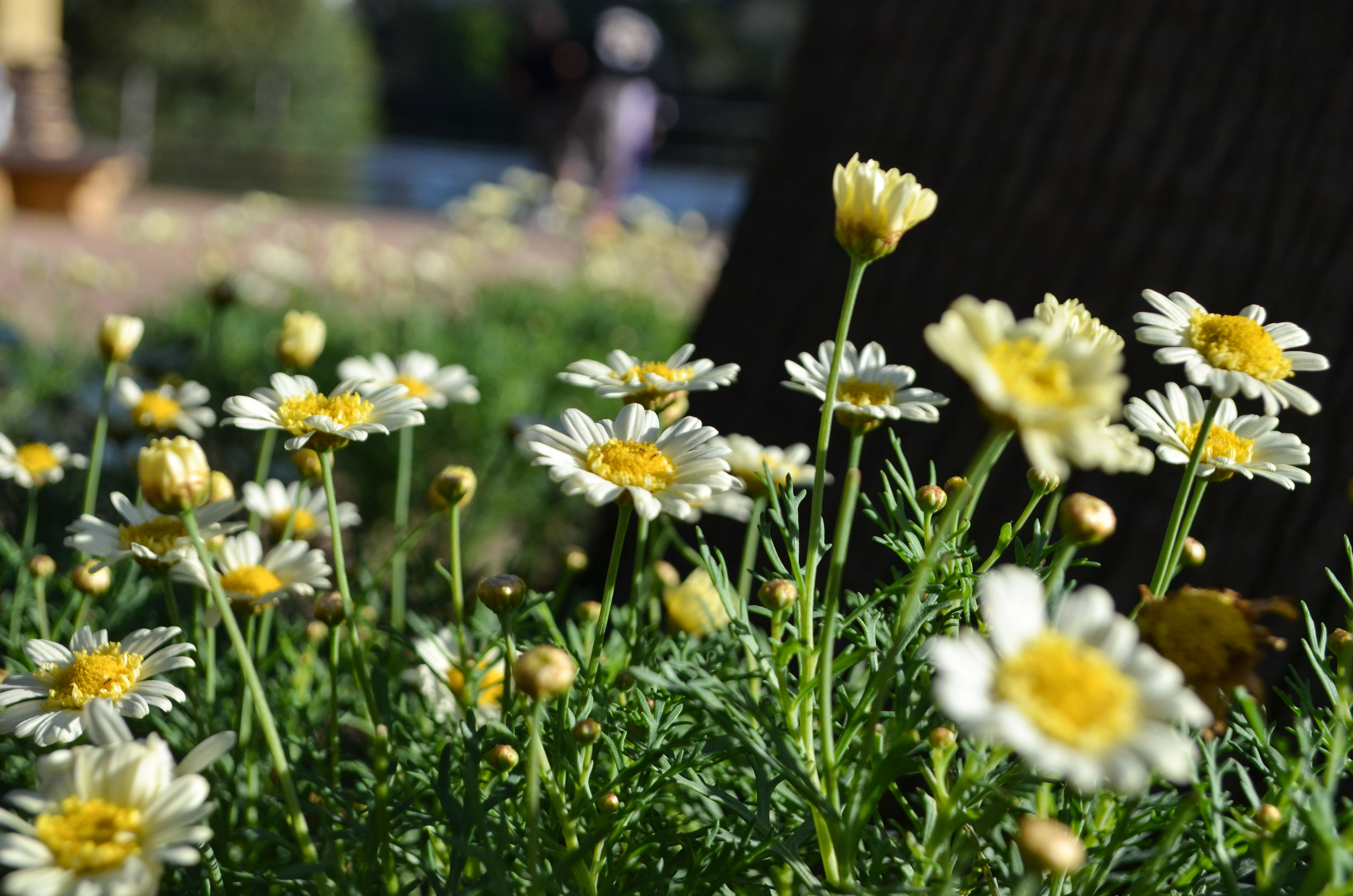 O início da estação no Parque Farroupilha. Crédito: Annie Castro (3º semestre)